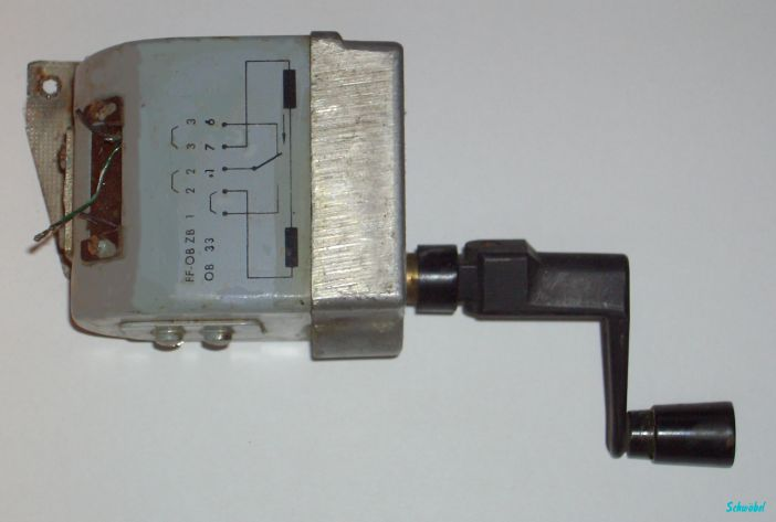 Kurbelinduktor